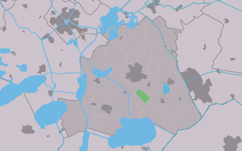 Kaartsje fan himrik fan Ousterhaule